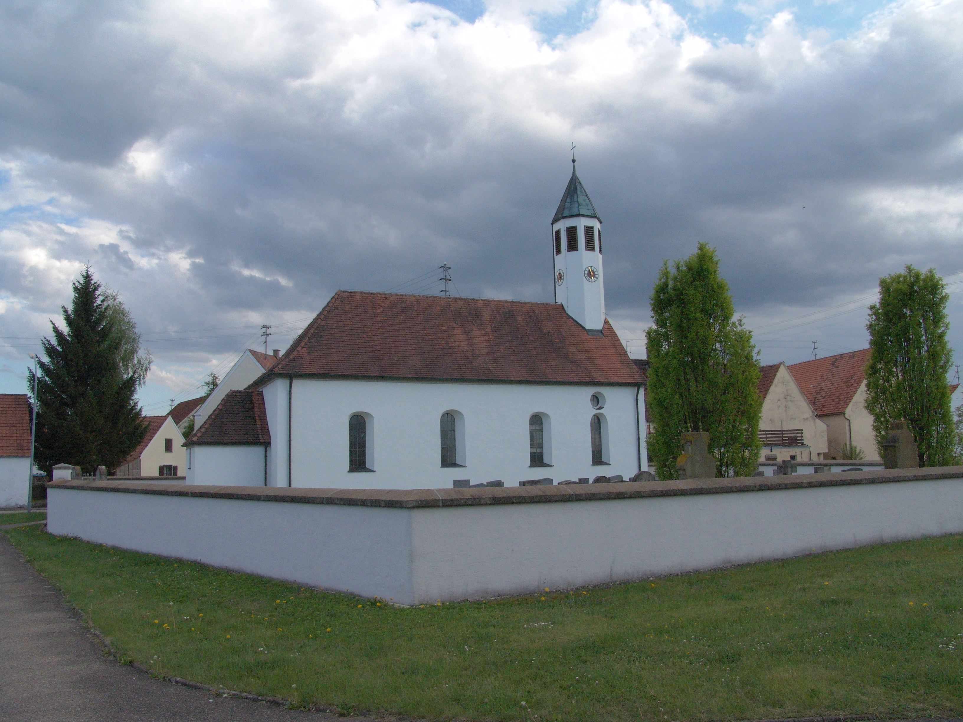 evang.-luth. Kirche St. Leonhard in Schwörsheim